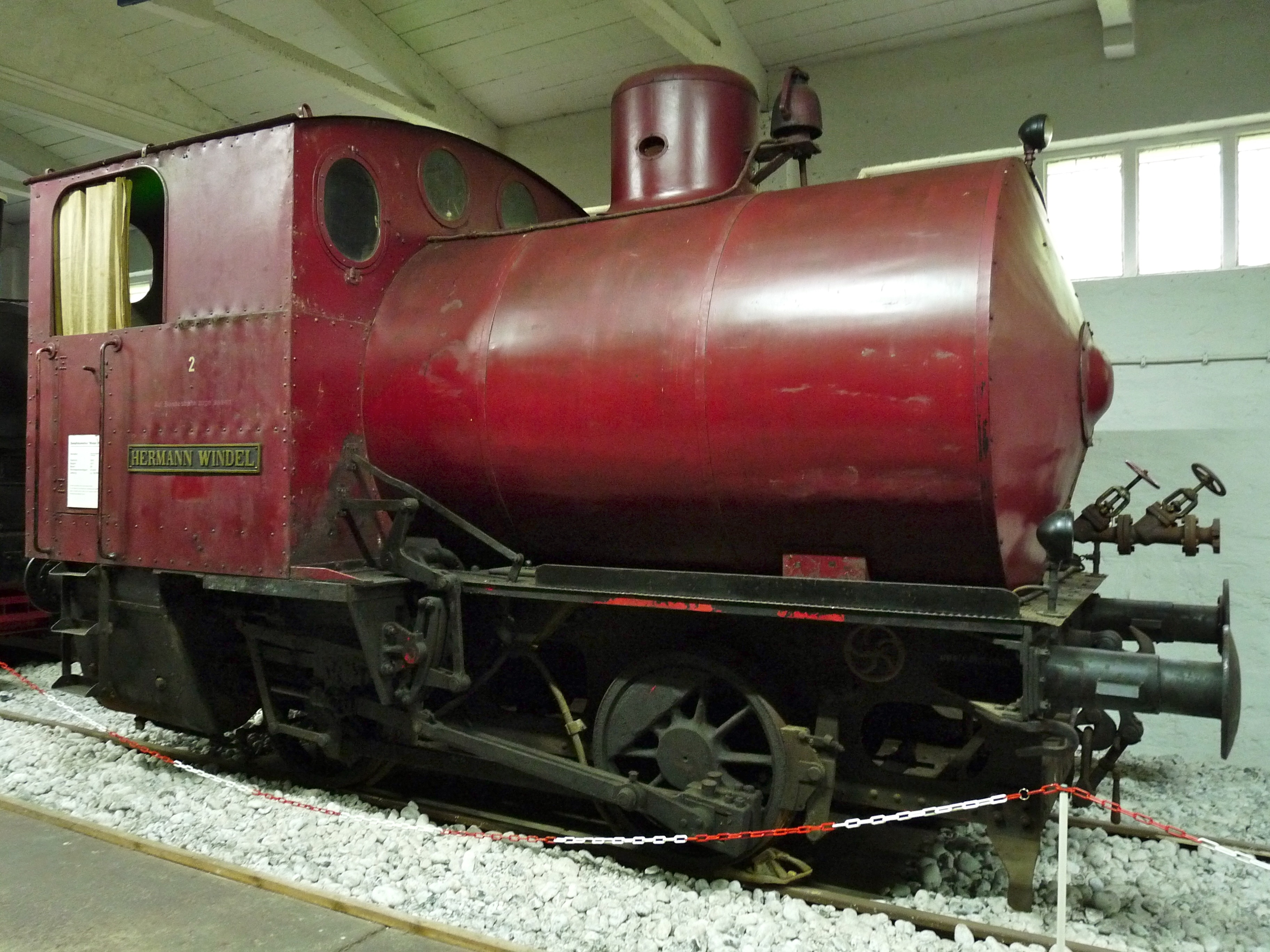 Feuerlose Dampflok "Hermann Windel 2" im Technikmuseum Prora.